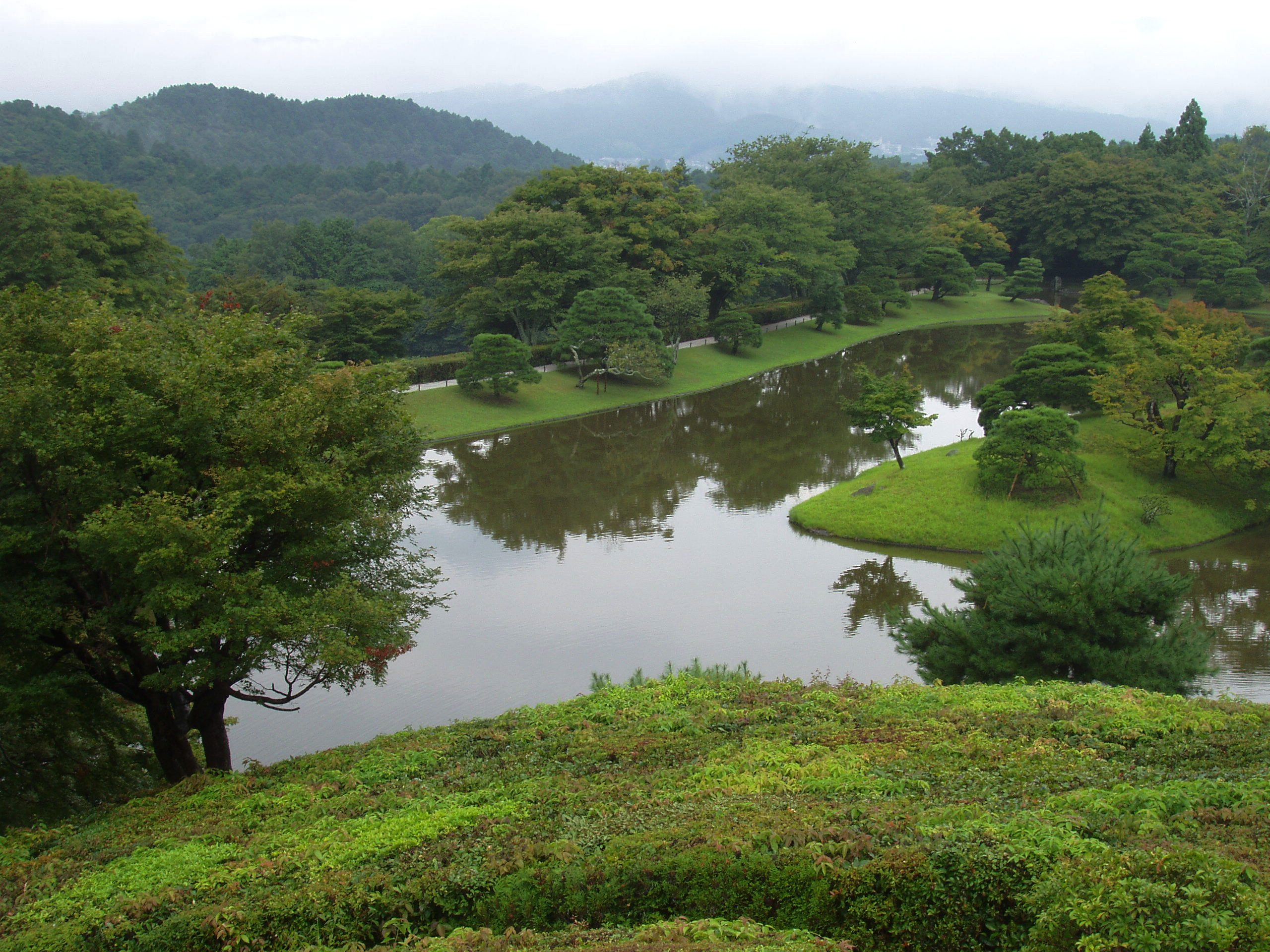 Shugaku-in Imperial Villa, Kyoto, Japan - Upper Garden pond.